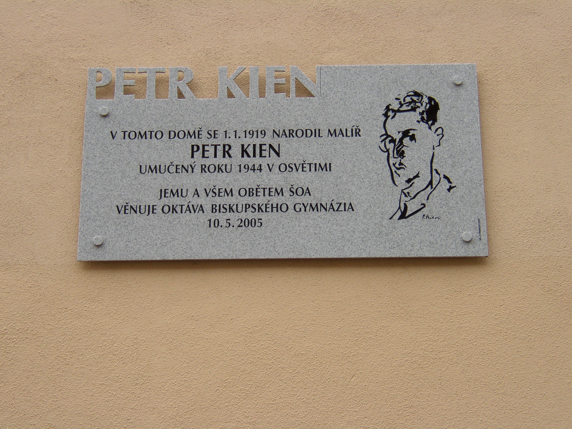 Česky: Pamětní deska na rodném domě Petra Kiena, Varnsdorf, okres Děčín, Česká republika